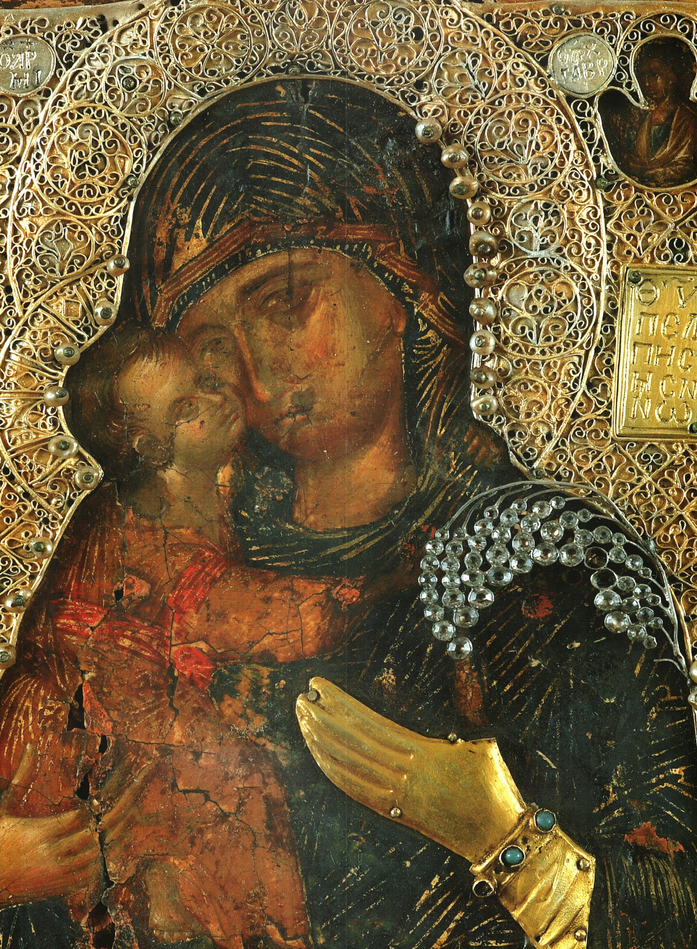 Богородица Гликофилуса (часть ватопедского диптиха известного как "игрушки императрицы Феодоры")